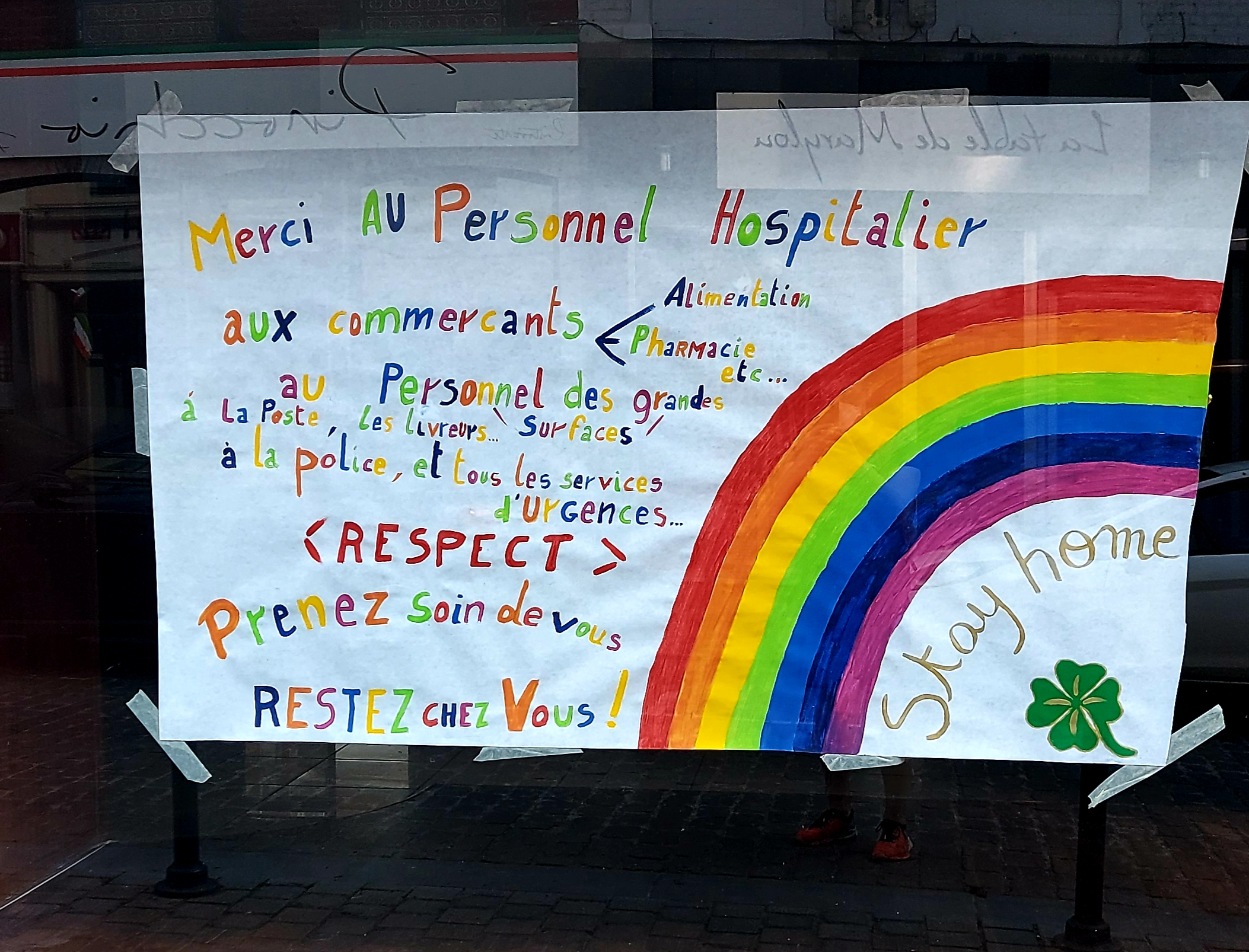 Message de soutien durant l'épidémie de covid-19 à Soignies